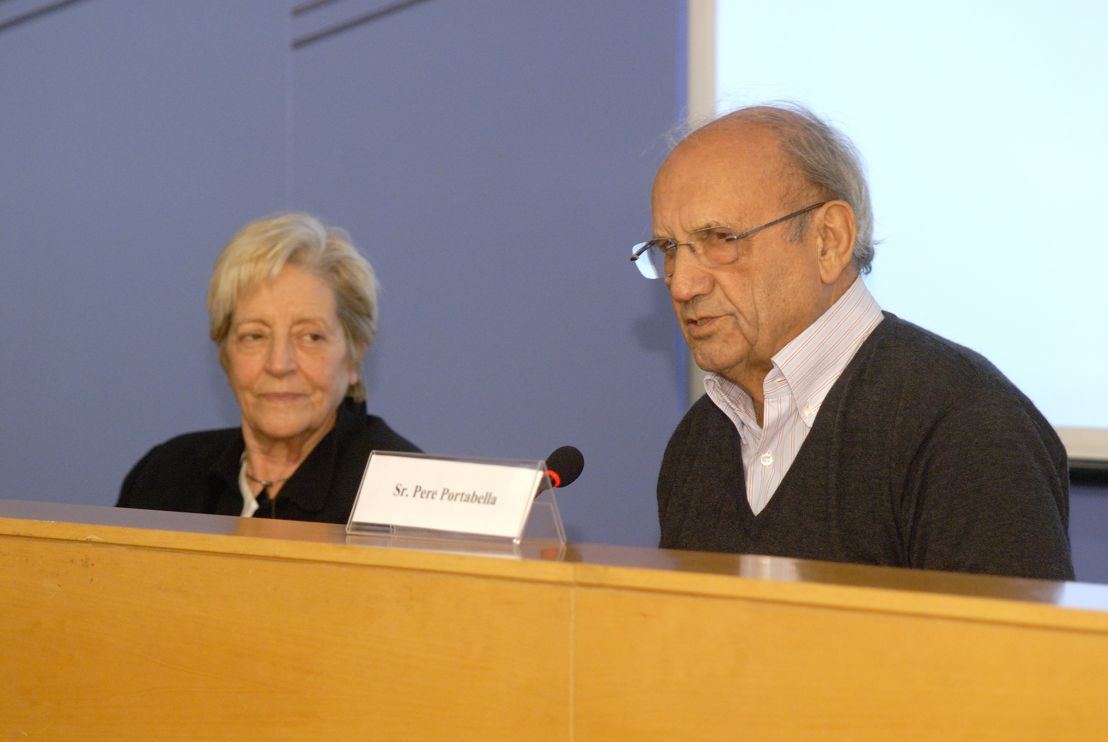 Pere Portabella al MHC el 2008, acompanyat de Laura Tremosa a la seva dreta.